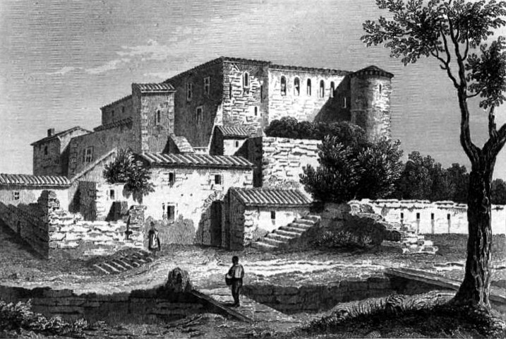 Image en provenance du livre : Eusèbe Girault de Saint-Fargeau, Guide pittoresque du voyageur en France, contenant la statistique et la description complète des quatre-vingt-six départements, orné de 740 vignettes et portraits gravés sur acier, de quatre-vingt-six cartes de départements et d'une grande carte routière de la France, par une Société de gens de lettres, de géographes et d'artistes, Paris, F. Didot frères, 1838, 6 volumes in-8° (BNF : 8-L25- 46). Volume III Didot frères, 1838. Route de Paris à Nice traversant les départements de l'Isère, des Hautes-Alpes, des Basses-Alpes et du Var. auteurs dessins : Rauch (ou autre) auteurs gravures : Skelton fils, Schroeder, Bishop (ou autre)